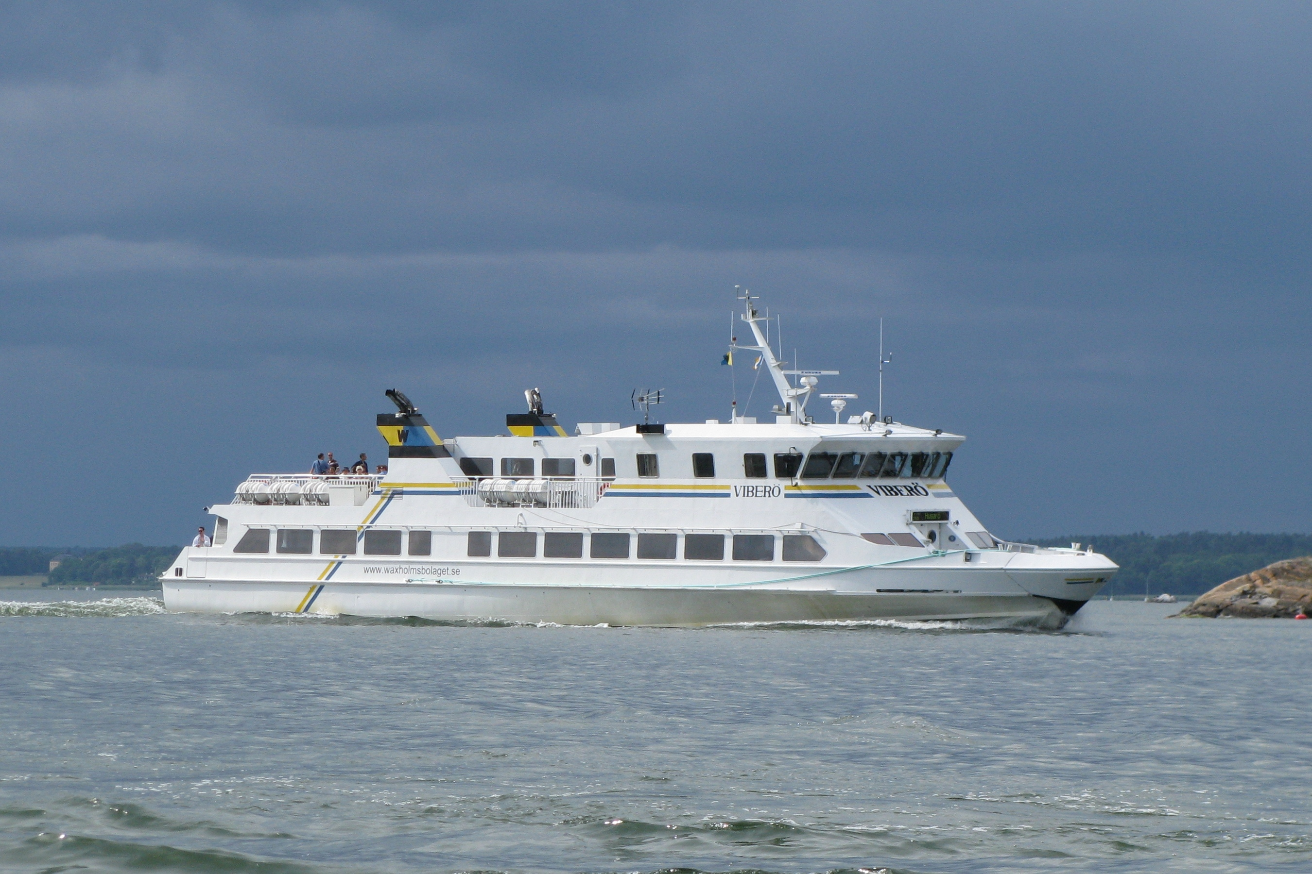 Waxholmsfärjan Viberö på väg in i Lindalssundet i Stockholms skärgård. IMO Number: 9048885 Callsign: SCRX Källa: eget foto, fotograf EnDumEn 4 juli 2009.